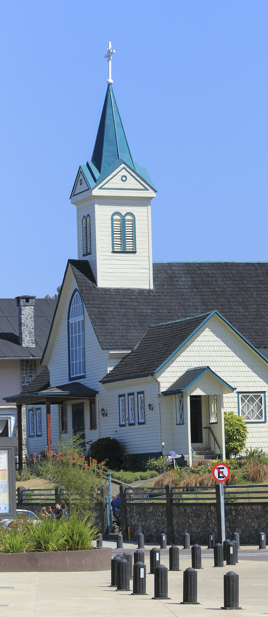 Templo Luterano de Frutillar This is a photo of a national monument in Chile: 2242